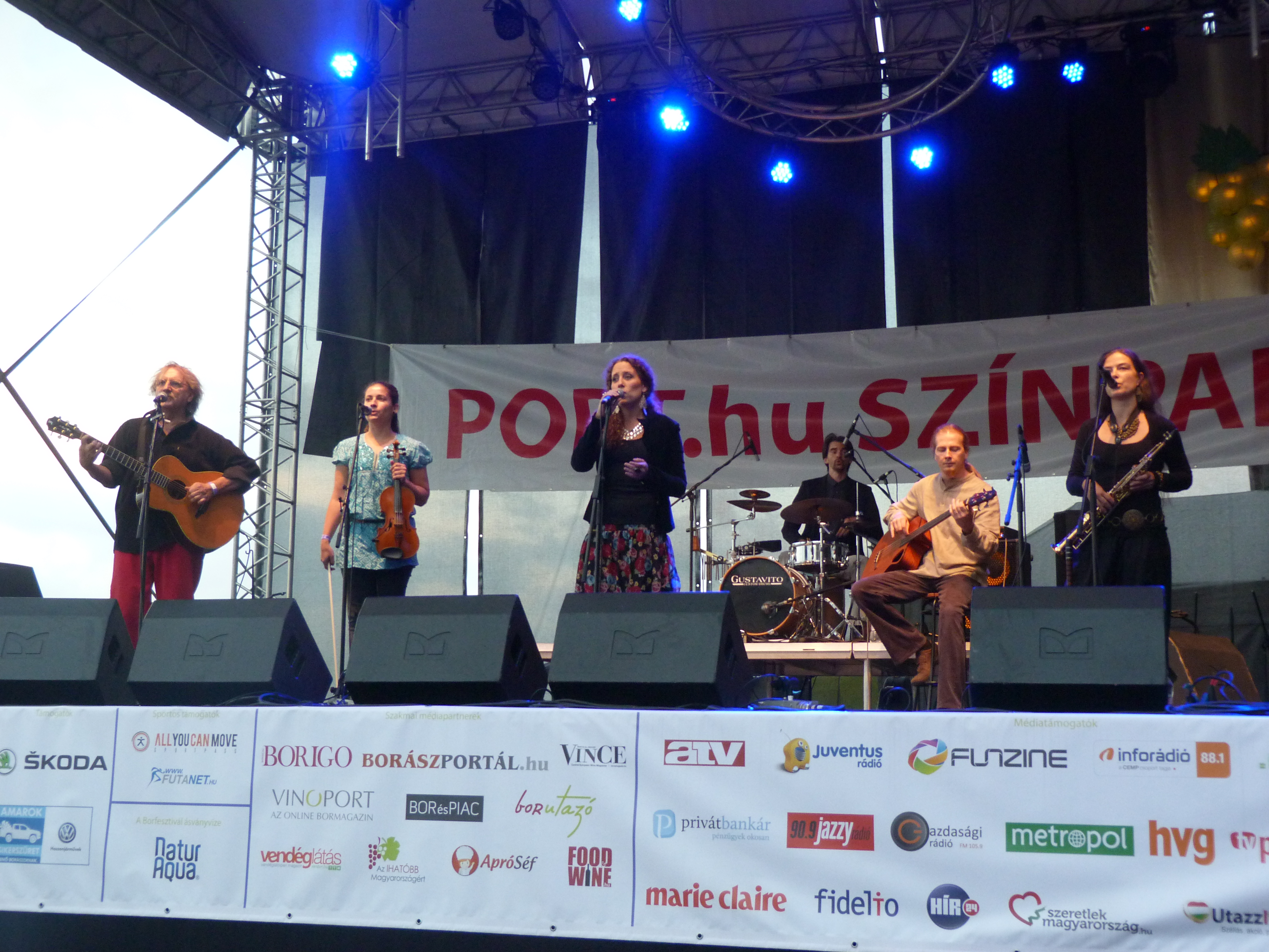 A felvétel 2014. szeptember 12-én, pénteken készült Budapesten, a 23. Budavári Borfesztiválon. Nagyszínpad, a Makám együttes és vendégei. Az együttes tagjai: Krulik Zoltán - gitár Korzenszky Klára - ének Kuczera Barbara – hegedű, vokál Boros Attila - basszusgitár Eredics Dávid - fúvós hangszerek Keönch László - ütőhangszerek Mohai György - hangmérnök ( Szalóki Ágnes, Lovász Irén. Bognár Szilvia: Katona sirató KATONA SIRATÓ MAKÁM BOGNÁR SZILVIA MIHI 2014 Források Bor és Pia borpiaci szakmai magazin 2014. augusztus Borfesztivál Melléklet 23. Budavári Borfesztivál kiállítási tájékoztató ©© Derzsi Elekes Andor, Budapest, 2014, A kép és filmfelvételek egészben, vagy részletekben másolását, bármilyen úton történő sokszorosítását és felhasználását a szerző ellenérték nélkül, jogutódjaira is kihatóan megengedi. Az engedély kiterjed a kereskedelmi célú hasznosításra is. Kéri azonban nevének feltüntetését a felhasználás során. A Metapolisz sorozat valamennyi képe és filmje Creative Commons alatti valamint kereskedelmi - for profit - célra is felhasználható. Ajánlott hivatkozás: Derzsi Elekes Andor: Metapolisz DVD line